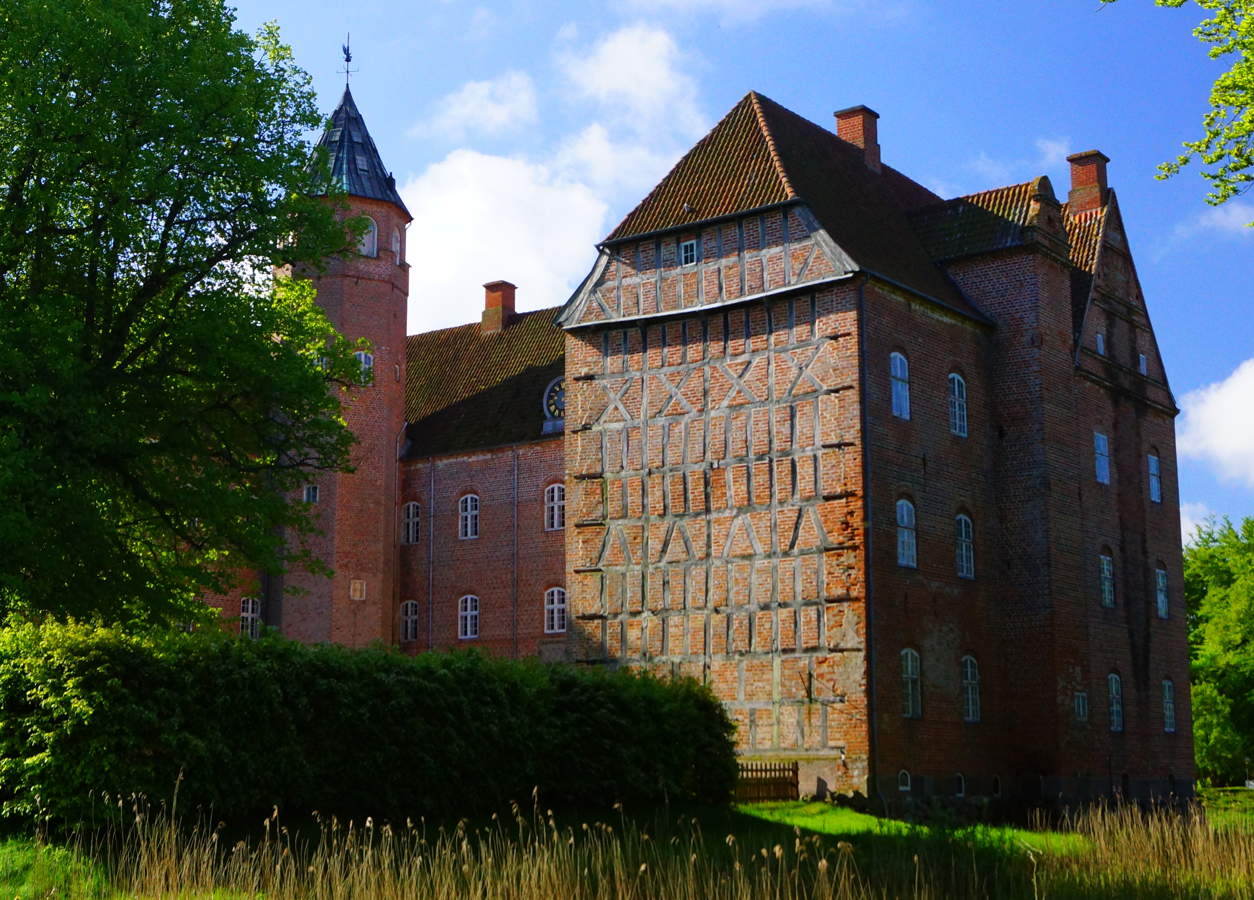 Sostrup Slot, Norddjursland